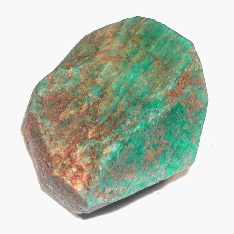 Amazonita, la variedad verde de microlina. Este ejemplar procede de Jefferson, Colorado